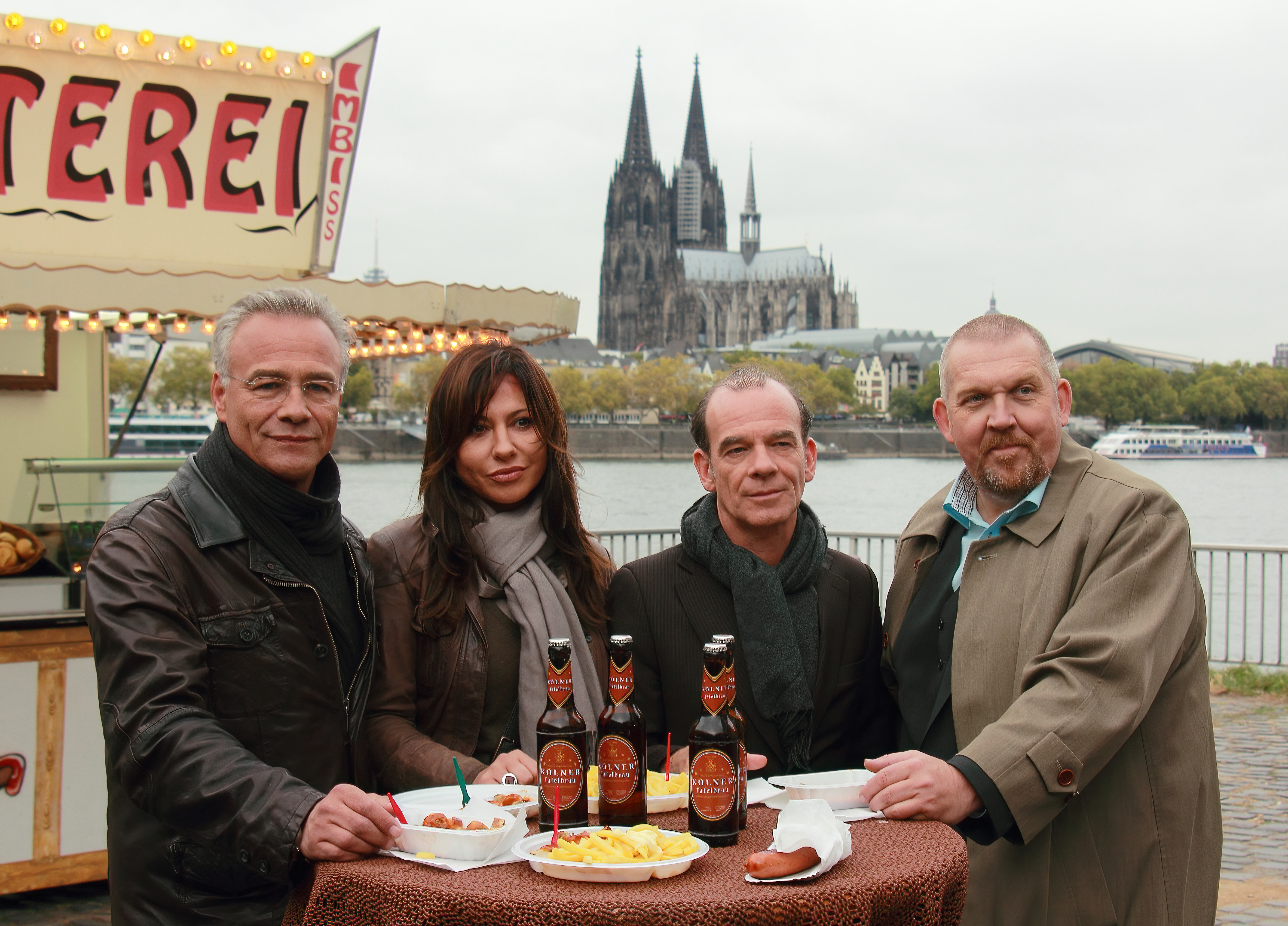 Dietmar Bär, Martin Wuttke, Simone Thomalla und Klaus J. Behrendt (von rechts nach links) spielen die Ermittlerduos Schenk/Ballauf (Köln) und Keppler/Saalfeld (Leipzig). Foto: WDR-Pressefototermin zum Kölner Tatort "Ihr Kinderlein kommet" Der Schnellimbiss-Tisch im Vordergrund sowie der Imbisswagen links sind Teil der Kulisse für den Tatort.